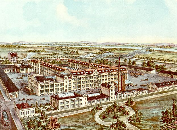 Salzmannbau-Jagenberg-Duesseldorf-1904